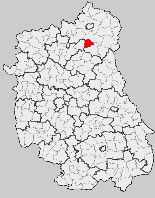 Map of gmina Rossosz, Biała Podlaska county, Lublin voivodship Mapa gminy Rossosz, powiat bialski, województwo lubelskie